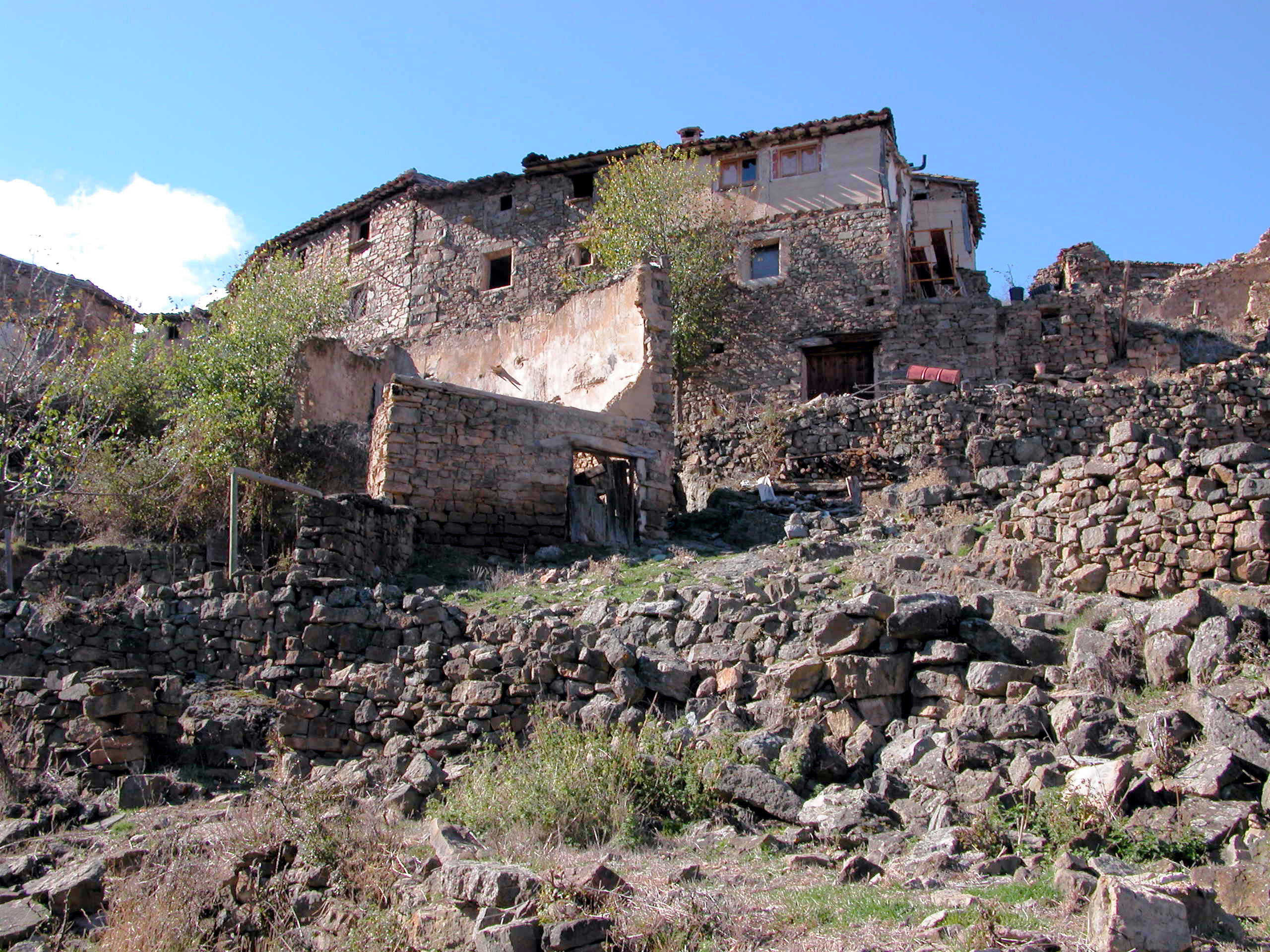 La Escurquilla, despoblado de Enciso, La Rioja (España).